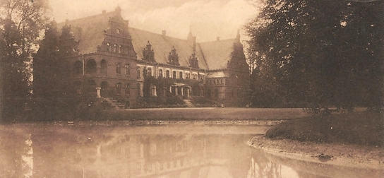 Gutshaus Melkof